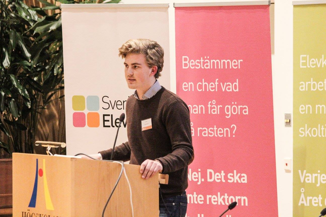 Emil Gustavsson under Sveriges Elevkårers kongress i Gävle 2014.